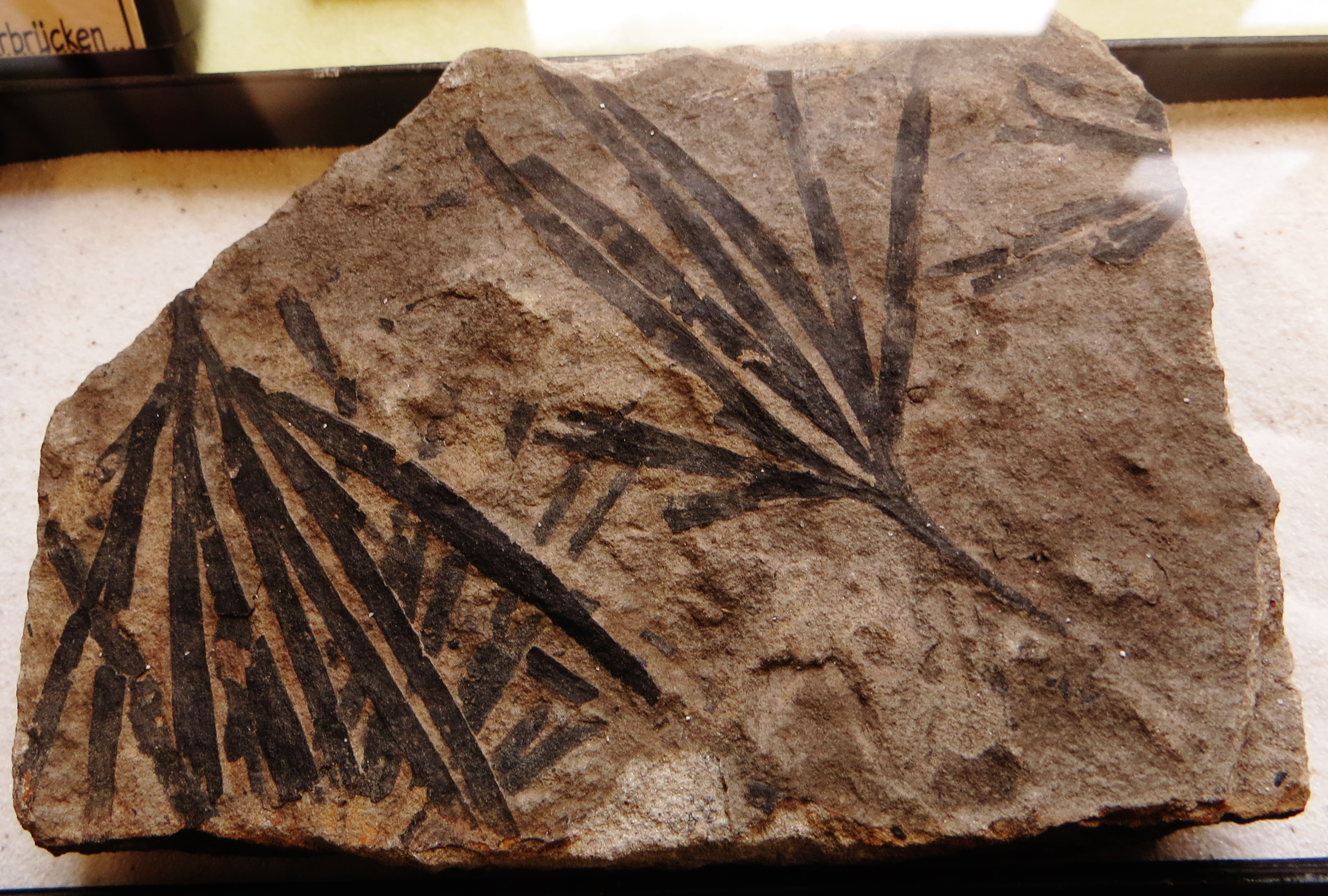 Fossil of plant - Took the picture at Natural History Museum, Bonn University